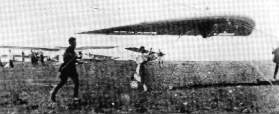 Plane Cheranovsky BICh-3 in volo nel 1926